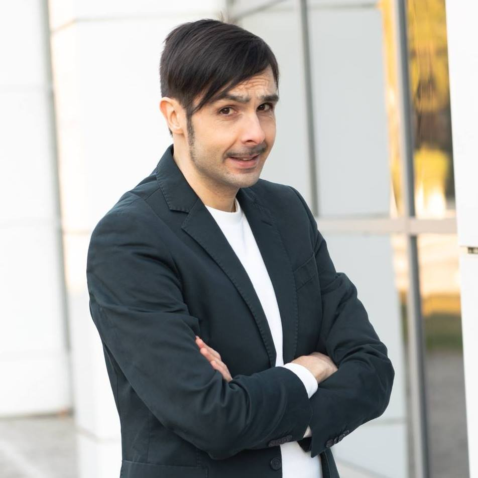 In foto Enrico Tamburini